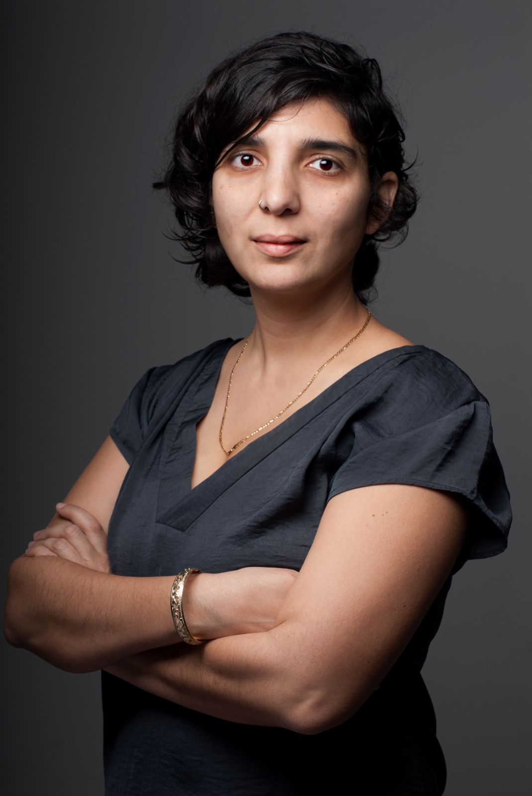 רעות נגר, 2018